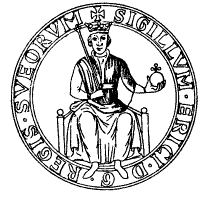 Erik Knutssons sigill